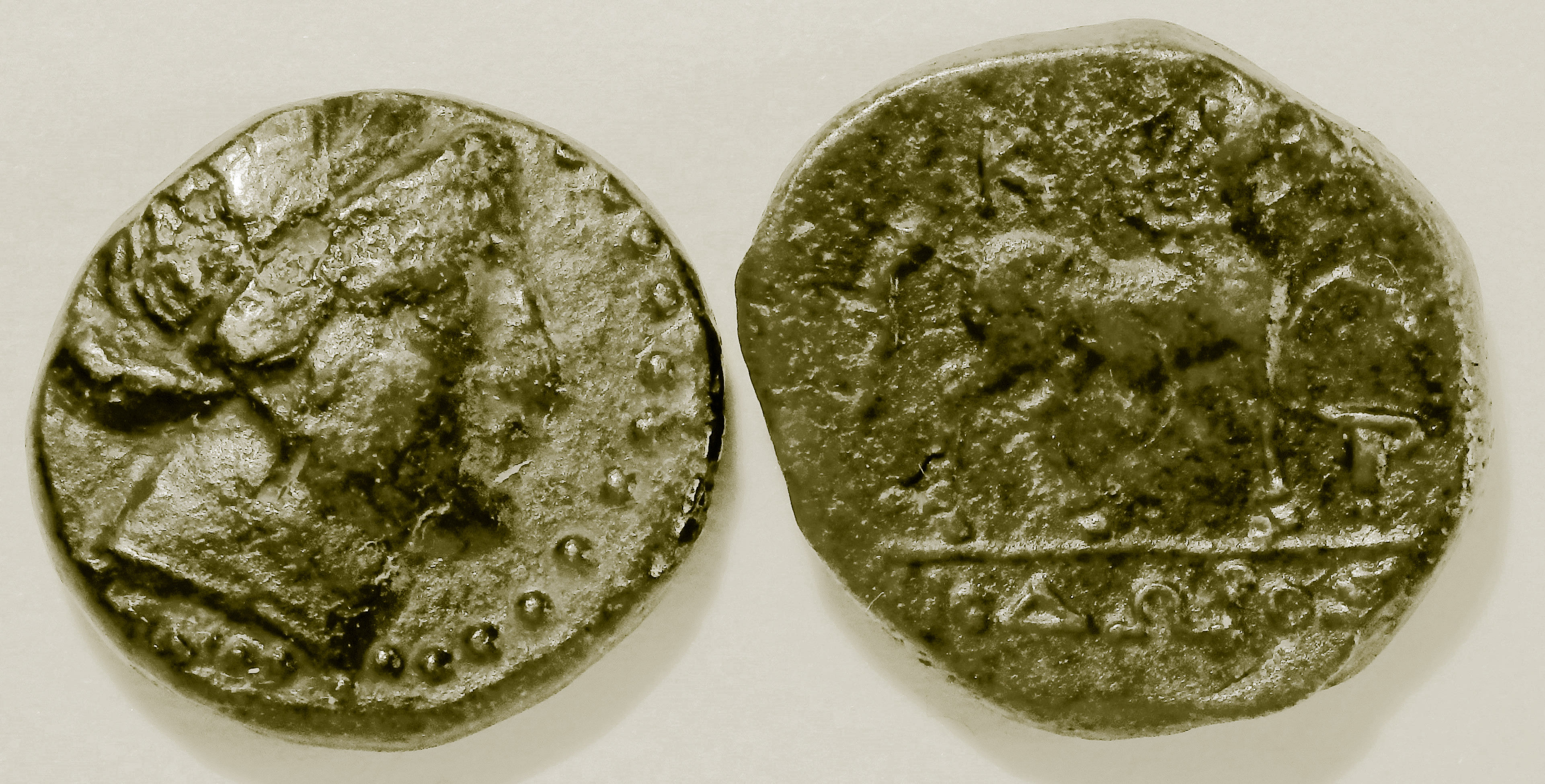 Bronzemünzen aus Kyme, Vorderseite Amazone, Rückseite Pferd, ca. 300-200 v. Chr., Szaivert/Sear 4184